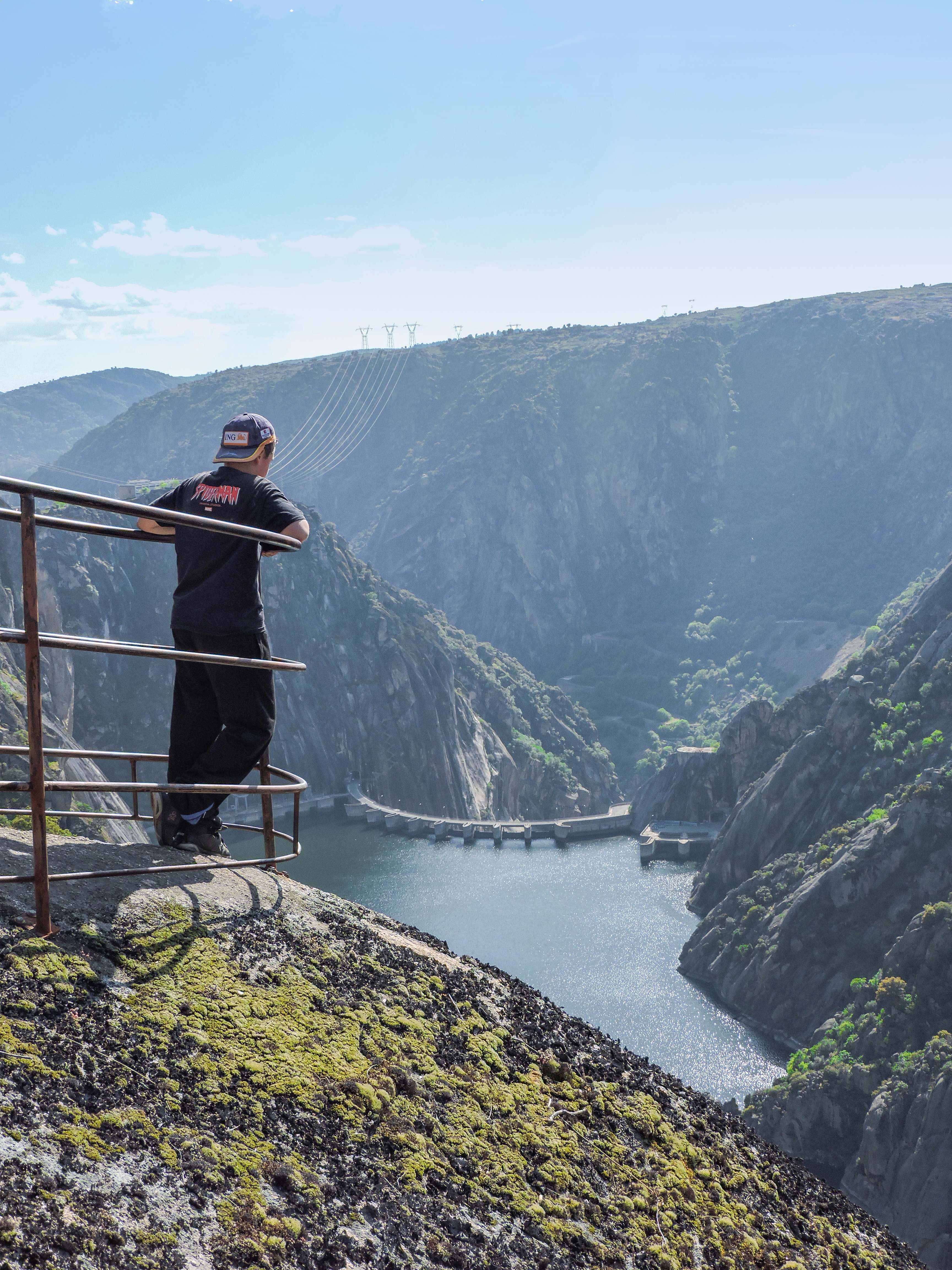 Espectacular mirador sobre el río Duero This is a photography of a Special Area of Conservation in Spain with the ID: ES4150096. Natura2000 entry, EEA entry